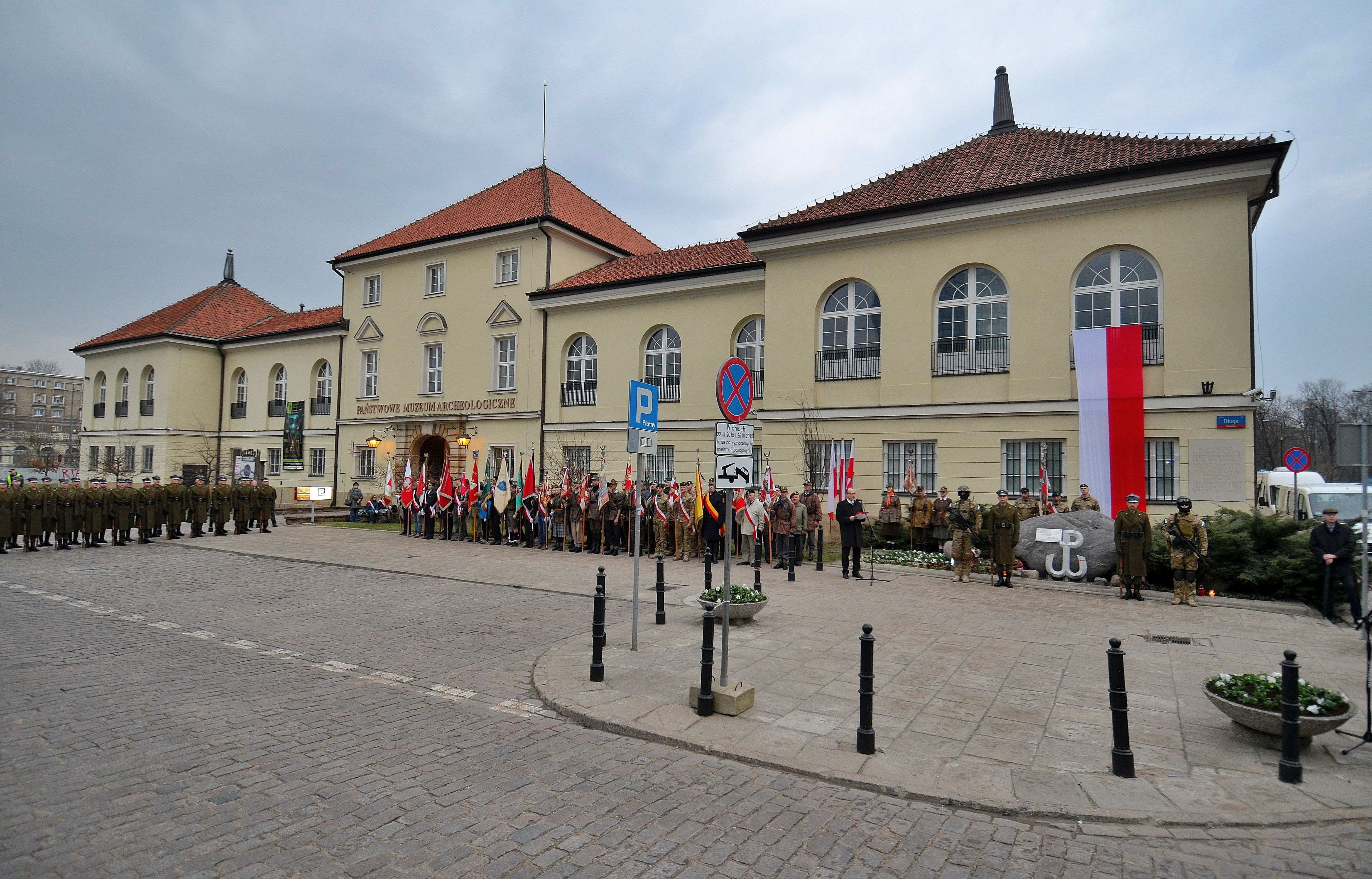 Uroczystości 72. rocznicy akcji pod Arsenałem